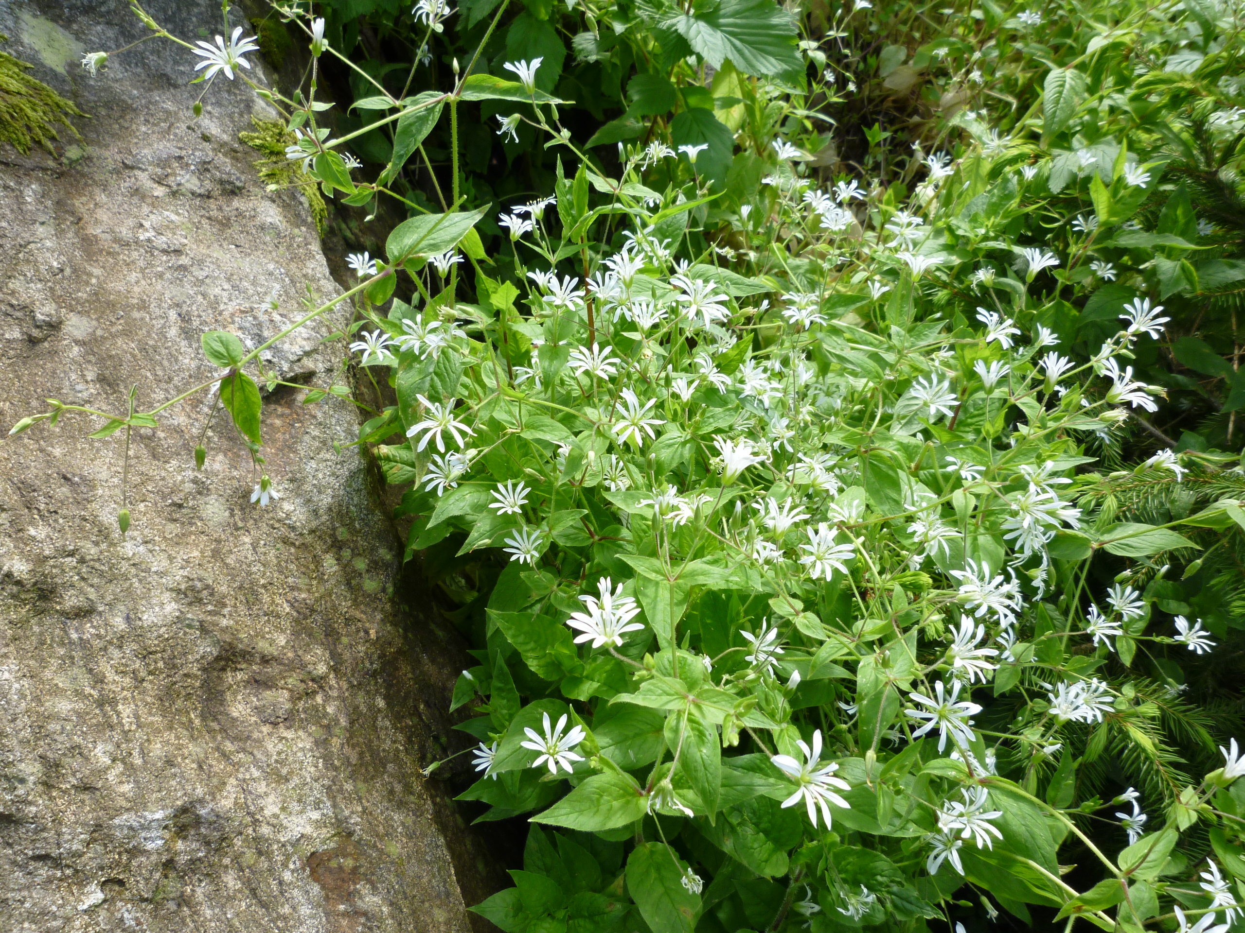 Sternmiere am Waldrand von Oberhaag, Landkreis Straubing-Bogen.